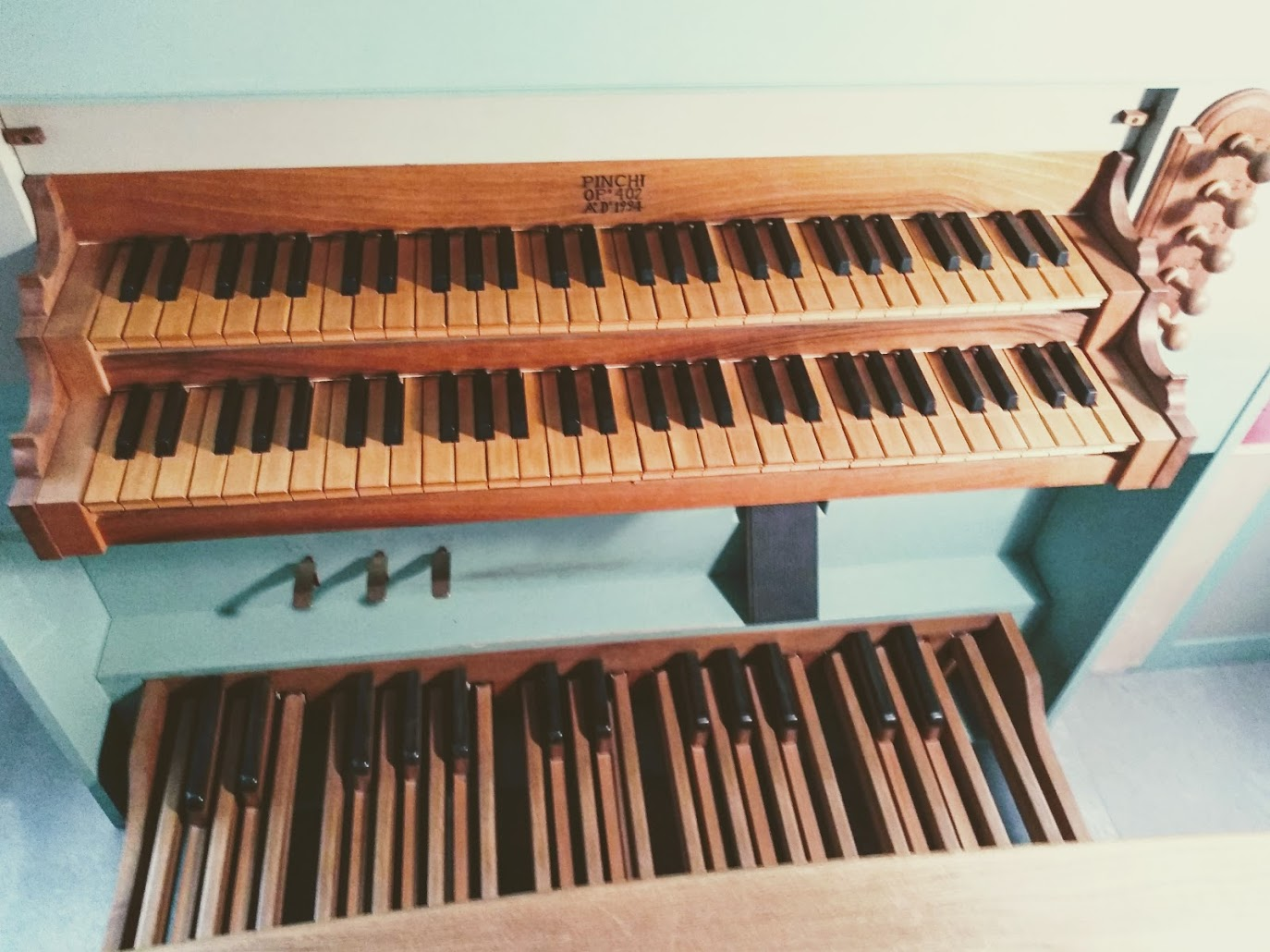 Frontseite der Pinchi-Orgel der Matthäus-Kirche in Bergtheim (Bayern/Deutschland)